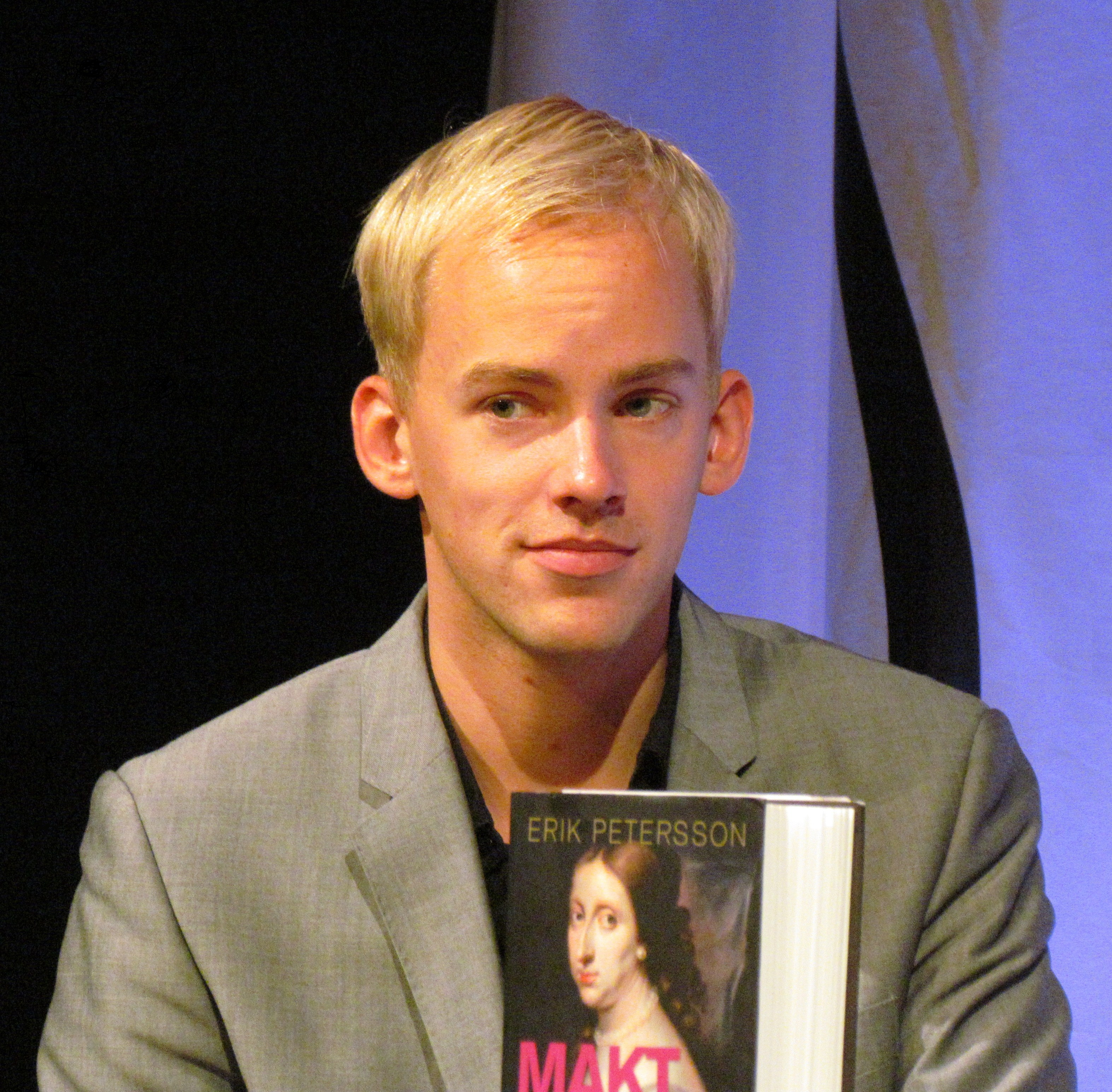 Historikern Erik Petersson intervjuas om sin nya bok Maktspelerskan, som handlar om drottning Kristina.